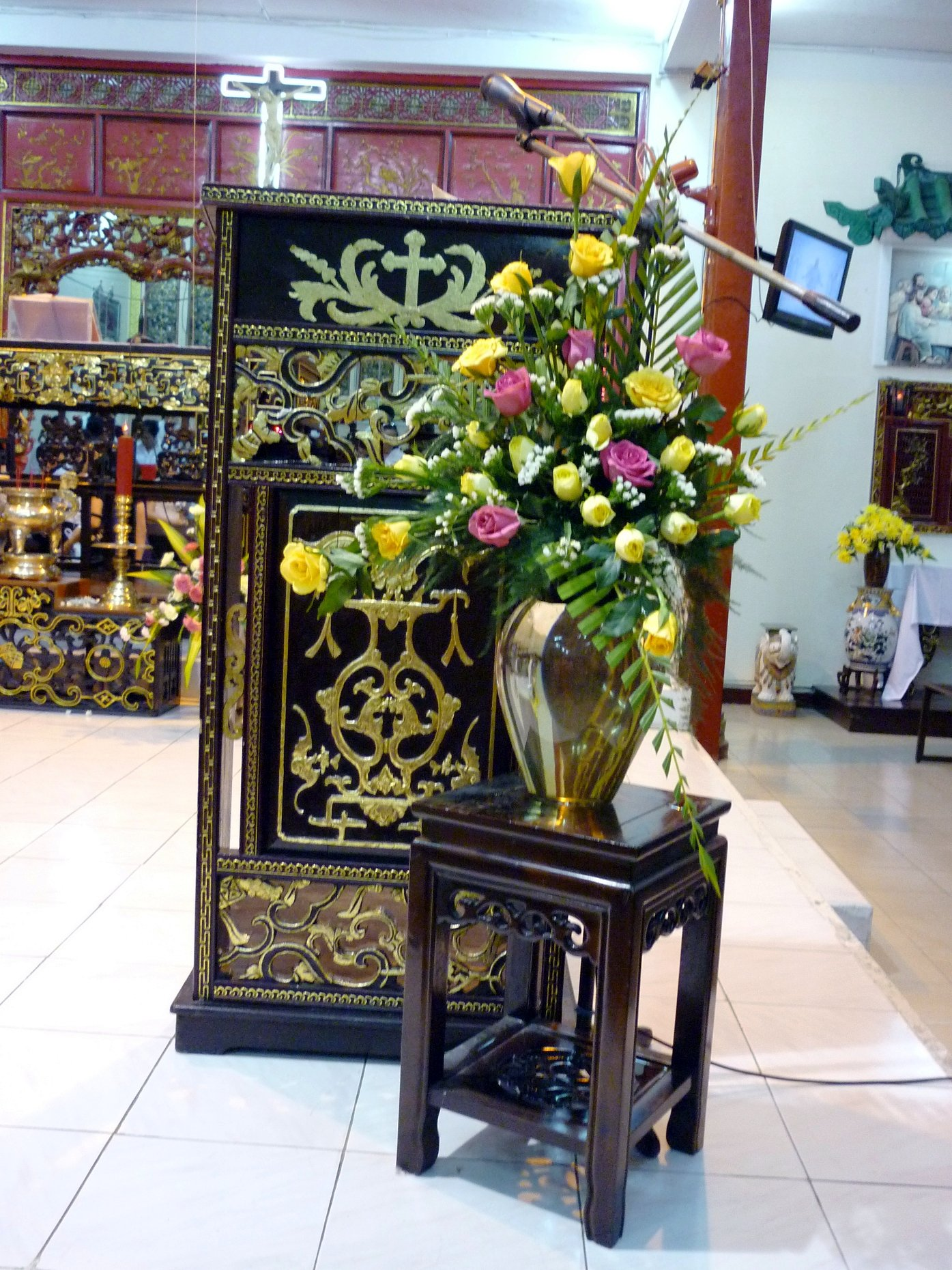 Bục giảng tại nhà thờ Đức Bà Hòa Bình, quận 1, thành phố Hồ Chí Minh